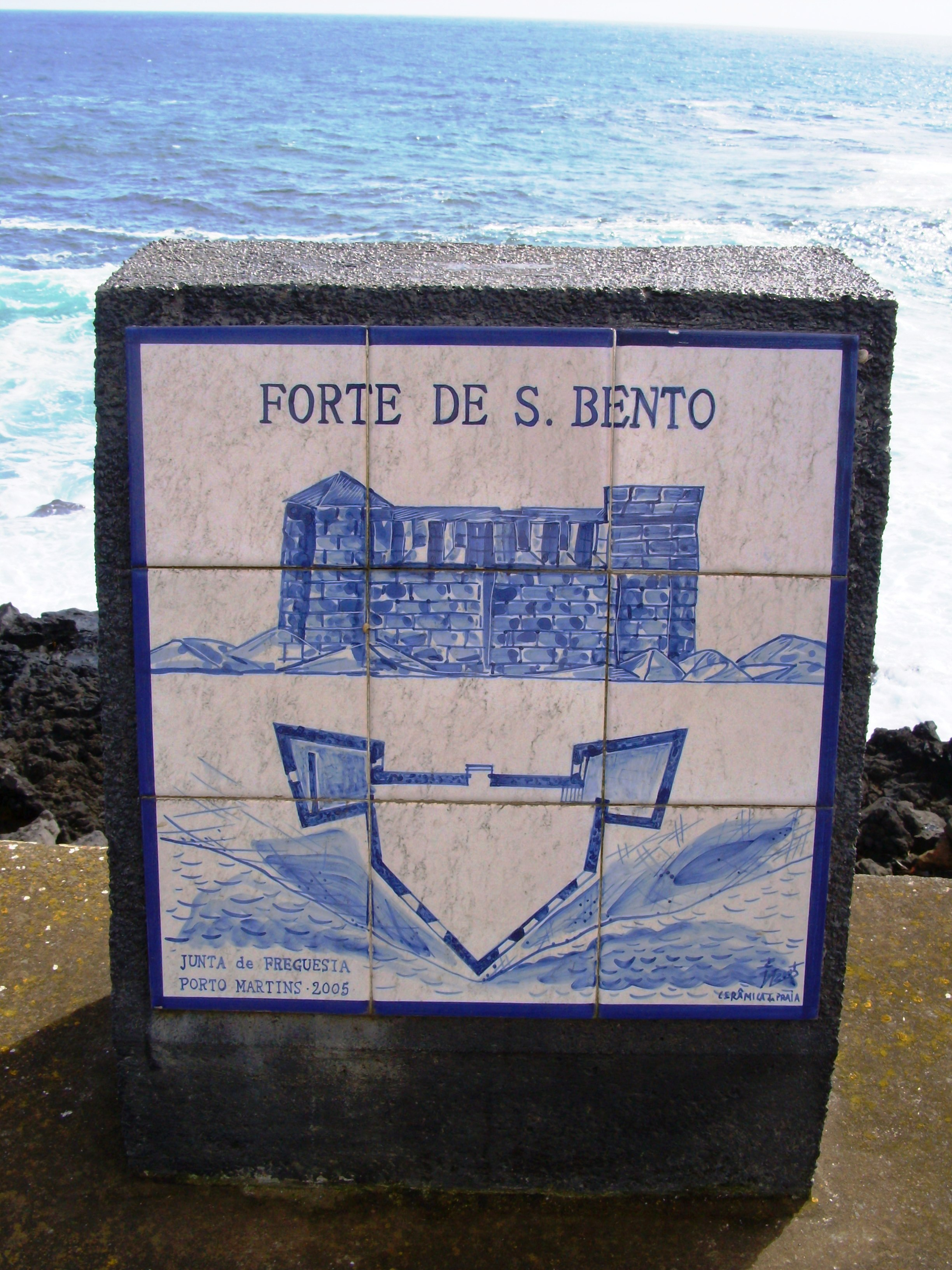 Forte de São Bento, Porto Martins, Praia da Vitória, Ilha Terceira, Açores: painel de azulejos reproduzindo a planta de José Rodrigo de Almeira (1830).